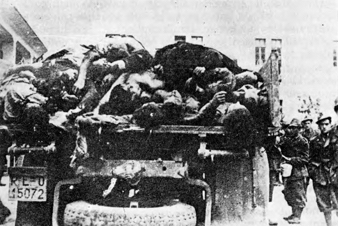 Padle borce in borke na Golobarju, ki so jih Italijani nametali na kamione in odpeljali v Bovec.